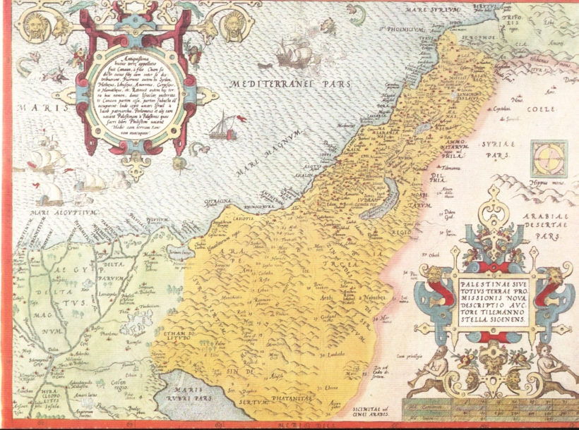 מפת הארץ המובטחת מאוירת